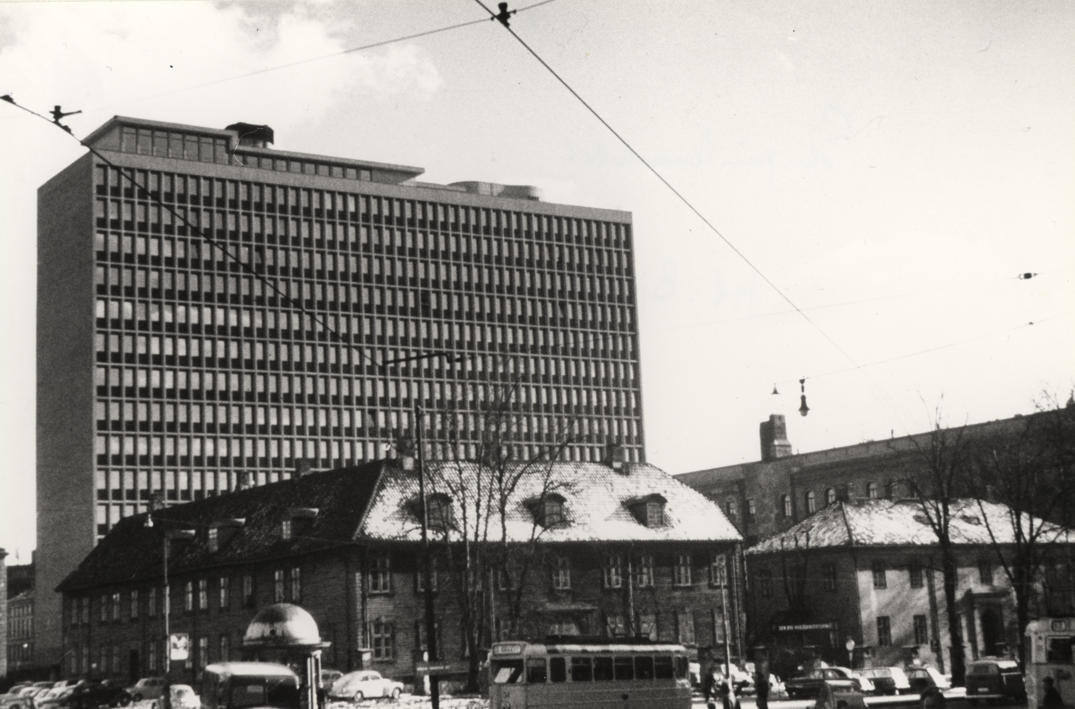 Militærhospitalet, Fødselsstiftelsen, Empirekvartalet i Oslo, Oslo Revet mellom 1954 og 1962 I bakgrunnen den nye regjeringsbygningen Trebygningen ble kjøpt av verneinteresserte (Sofie Helene Wigert), ble merket og demontert og lagret på Folkemuseet, Den ble gjenreist på Grev Wedels plass og rehabilitert i 1984 Gamle rikshospitalet